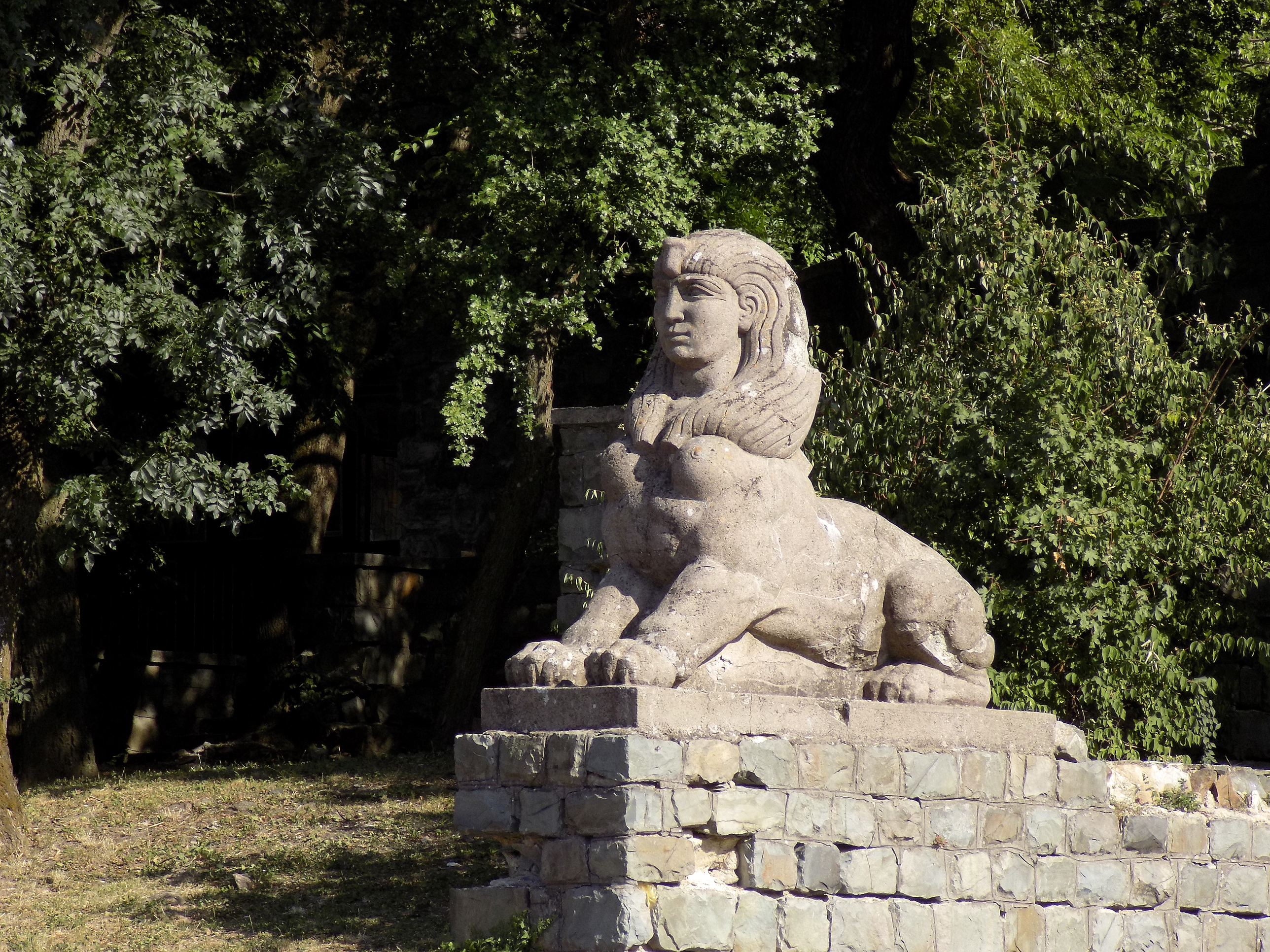 Sfinga na ulazu u hotel "Avala" na planini Avala pored Beograda